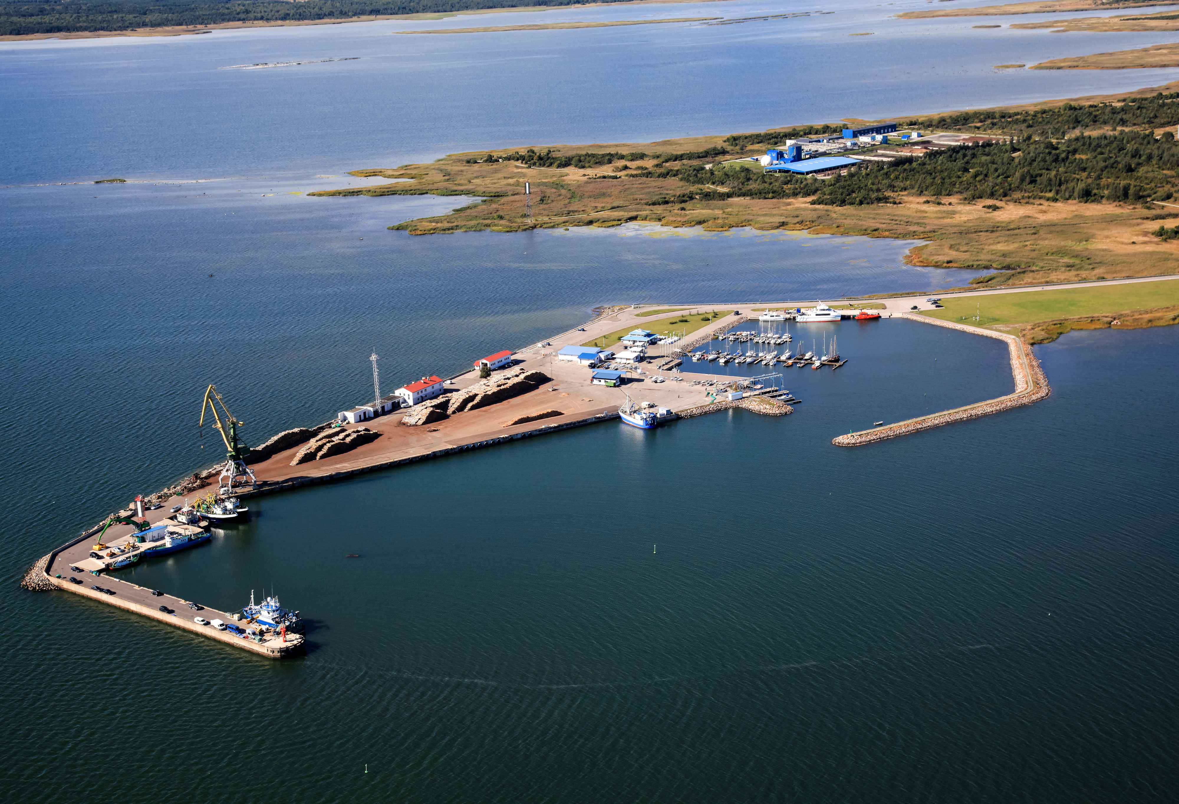 Roomassaare sadam 2015